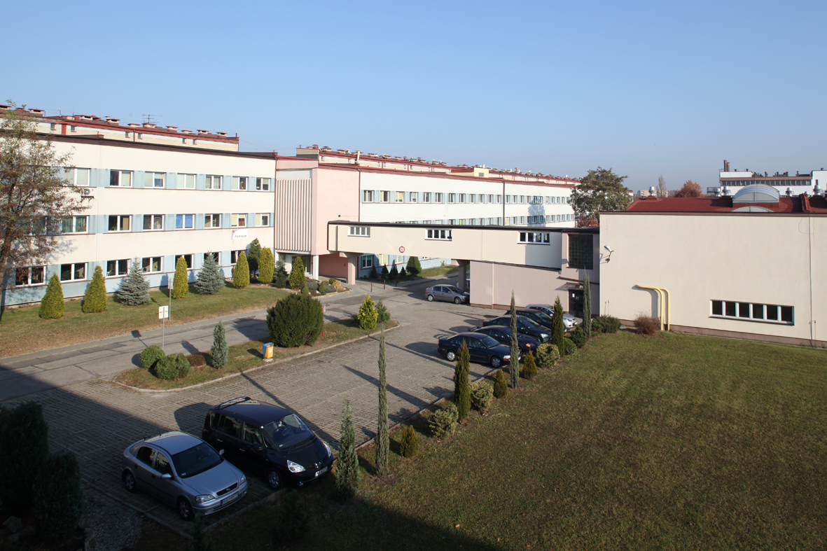 Widok Instytutu Metali Nieżelaznych w Gliwicach. Stan obecny (rok 2011)